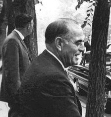 Roberto F. Chiari, presidente de Panamá (1960-1964)